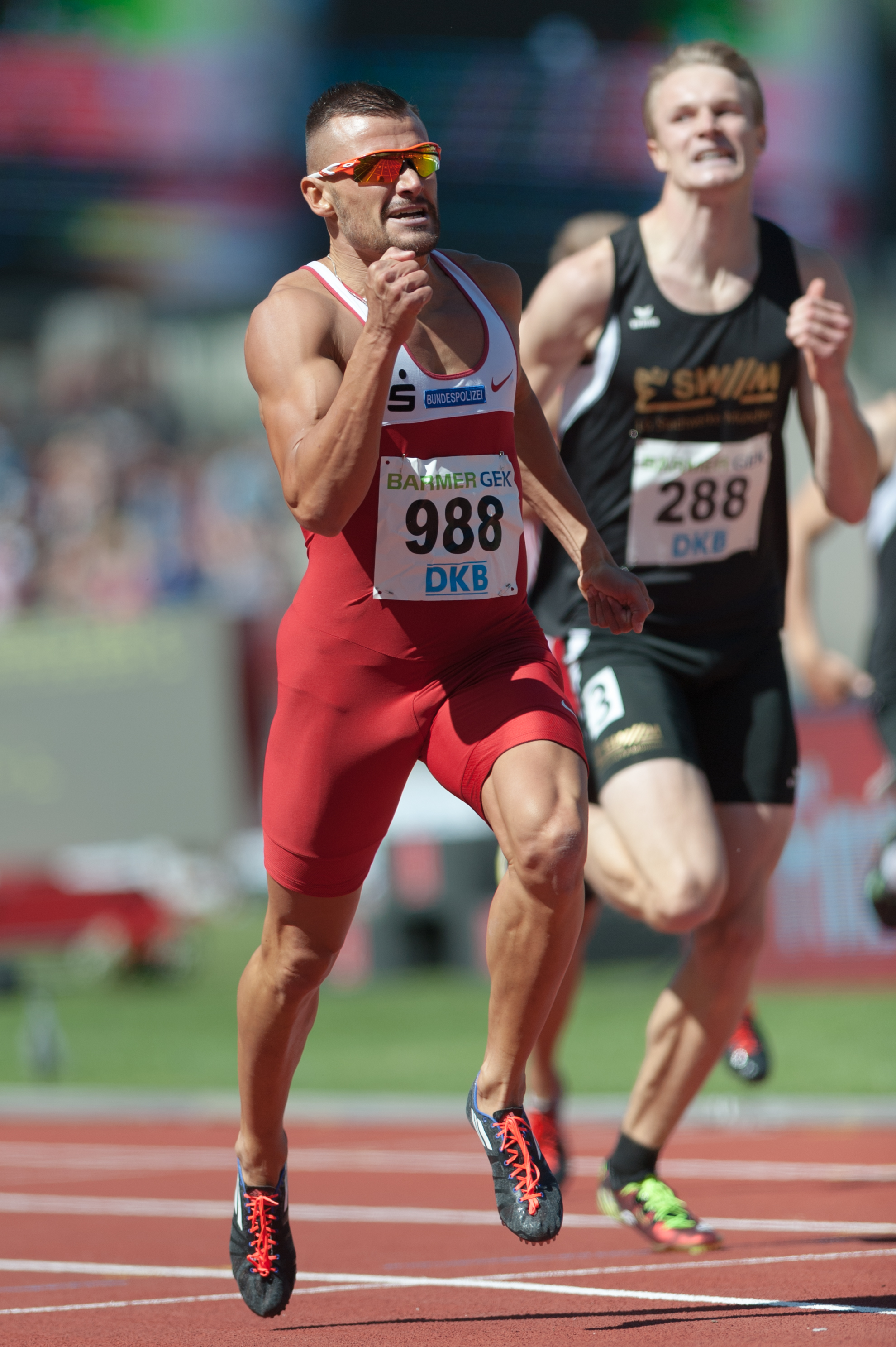 Deutsche Leichtathletik-Meisterschaften 2015: Männer 400m - Eric Krüger, Sportclub Magdeburg